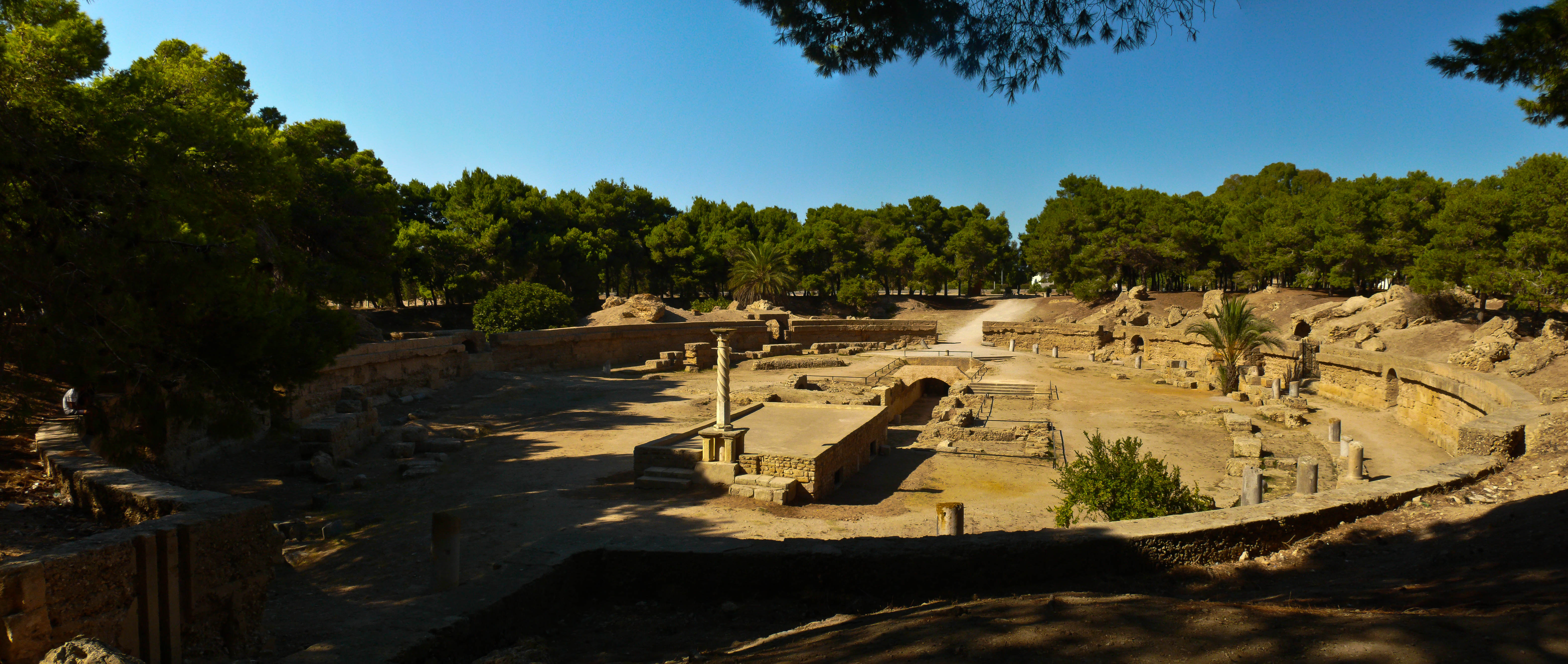 Amphithéâtre romain, Carthage